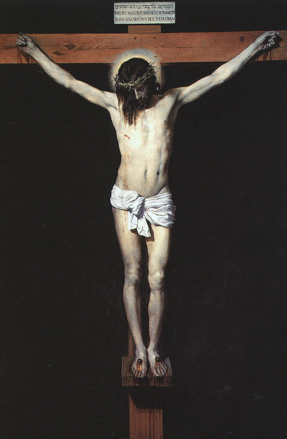 La obra representa a Jesucristo crucificado, y es una de las obras religiosas más conocidas del pintor sevillano Diego Velázquez.